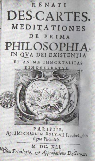 Meditationes de prima philosophia - Renatus Cartesius